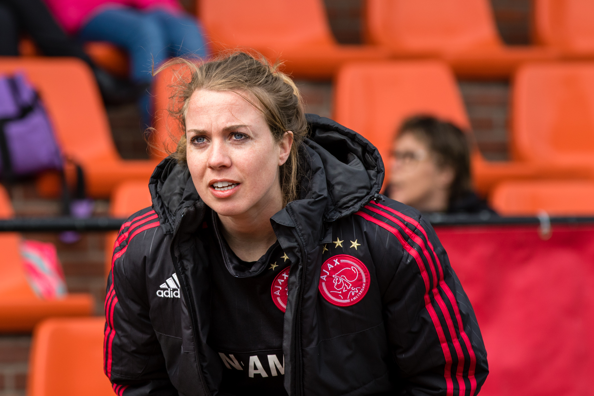 Marlous Pieëte tijdens een clinic van Ajax Vrouwen voor de jeugd van Longa '30 in Lichtenvoorde